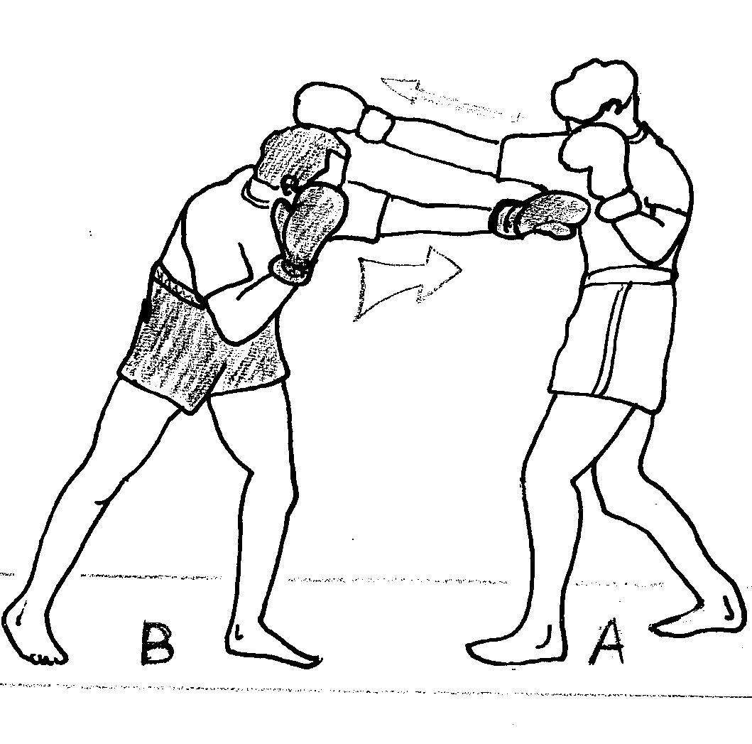 direct_corps1.jpg